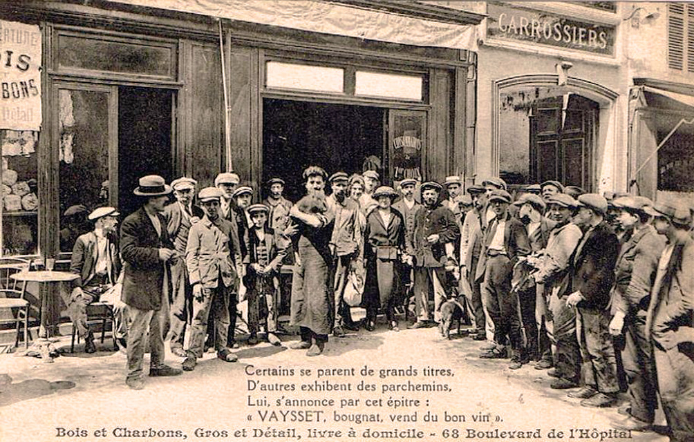 Boutique de bougnat à Paris au début du XXe siècle